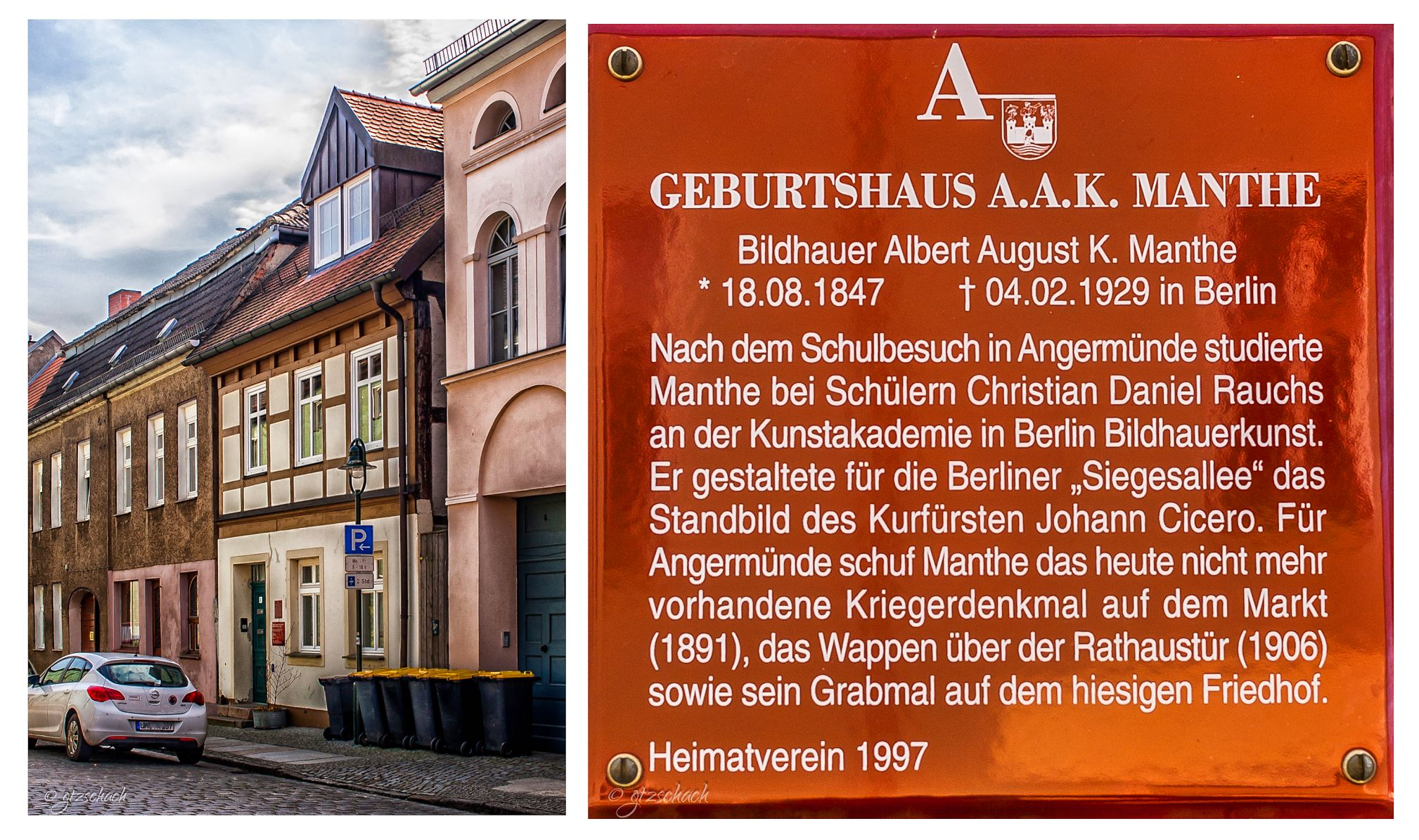 Geburtshaus von Albert August Karl Manthe in Angermünde Brüderstrasse 7